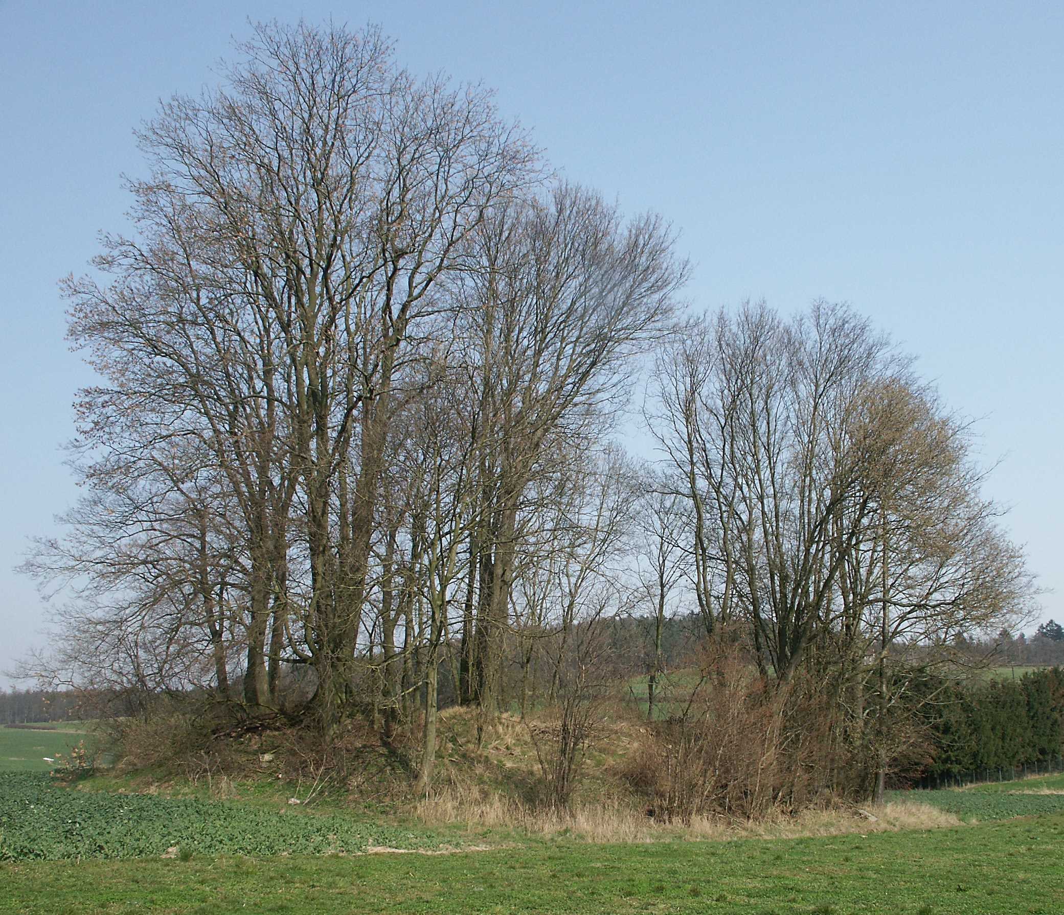 Burghügel der Ruine Altwehrda